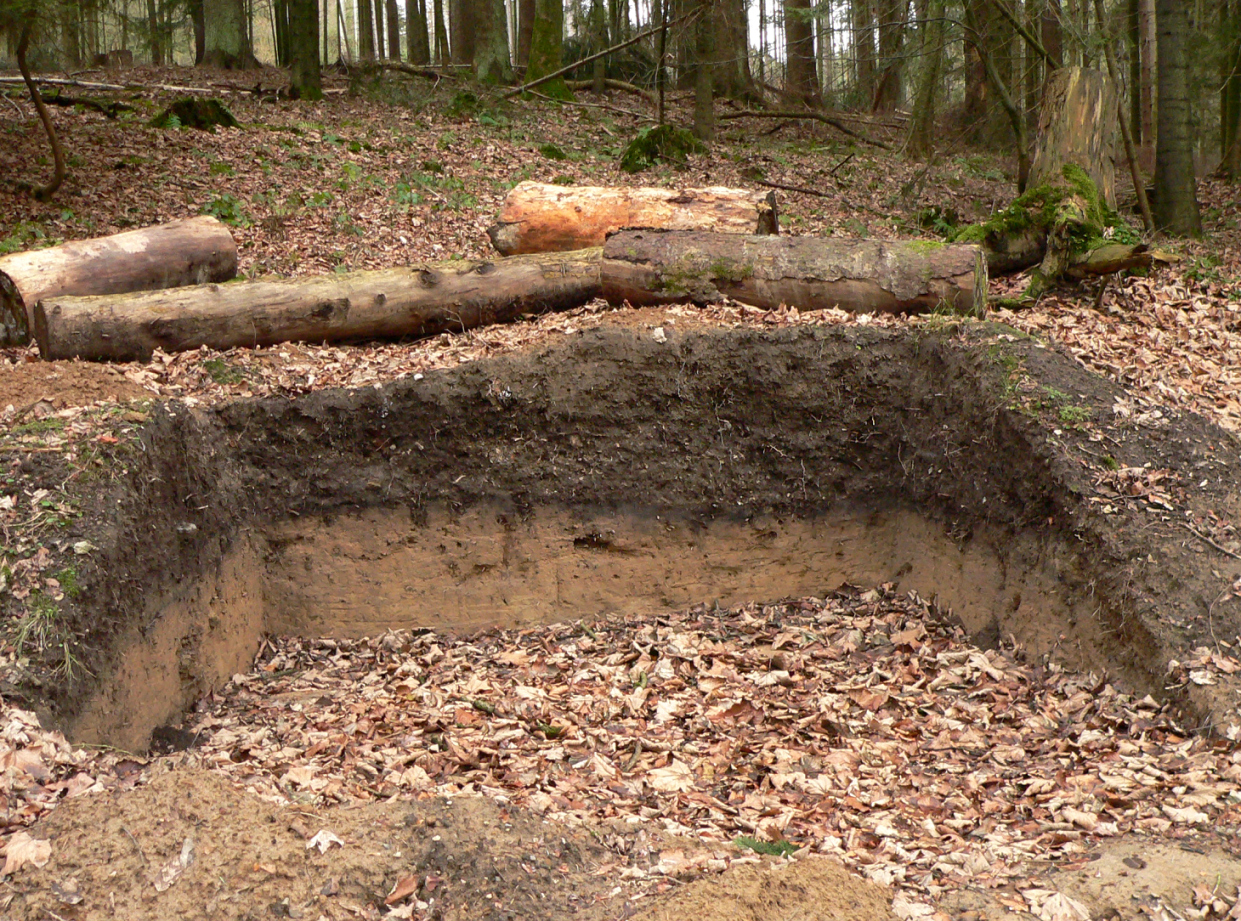 Erdaufschluss an der Ausgrabungsstelle Waldglashütte unter dem Hilsborn